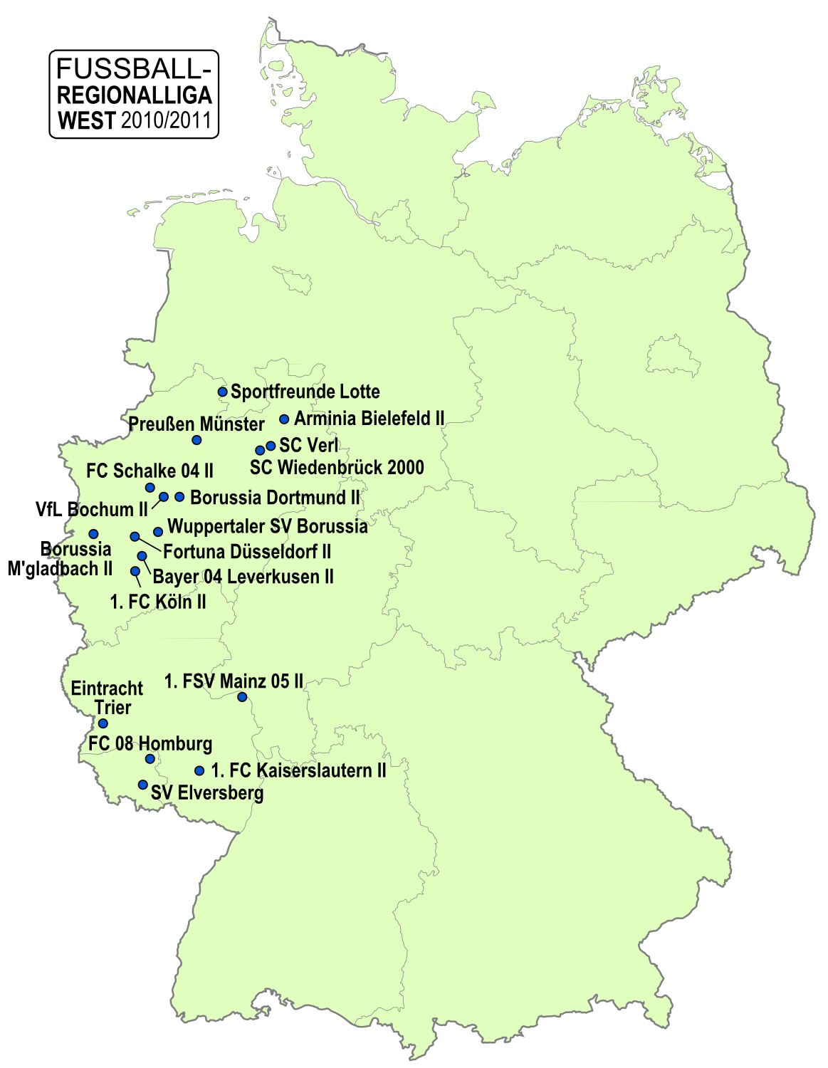 Karte der Vereine der Fußball-Regionalliga West, Saison 2010/2011